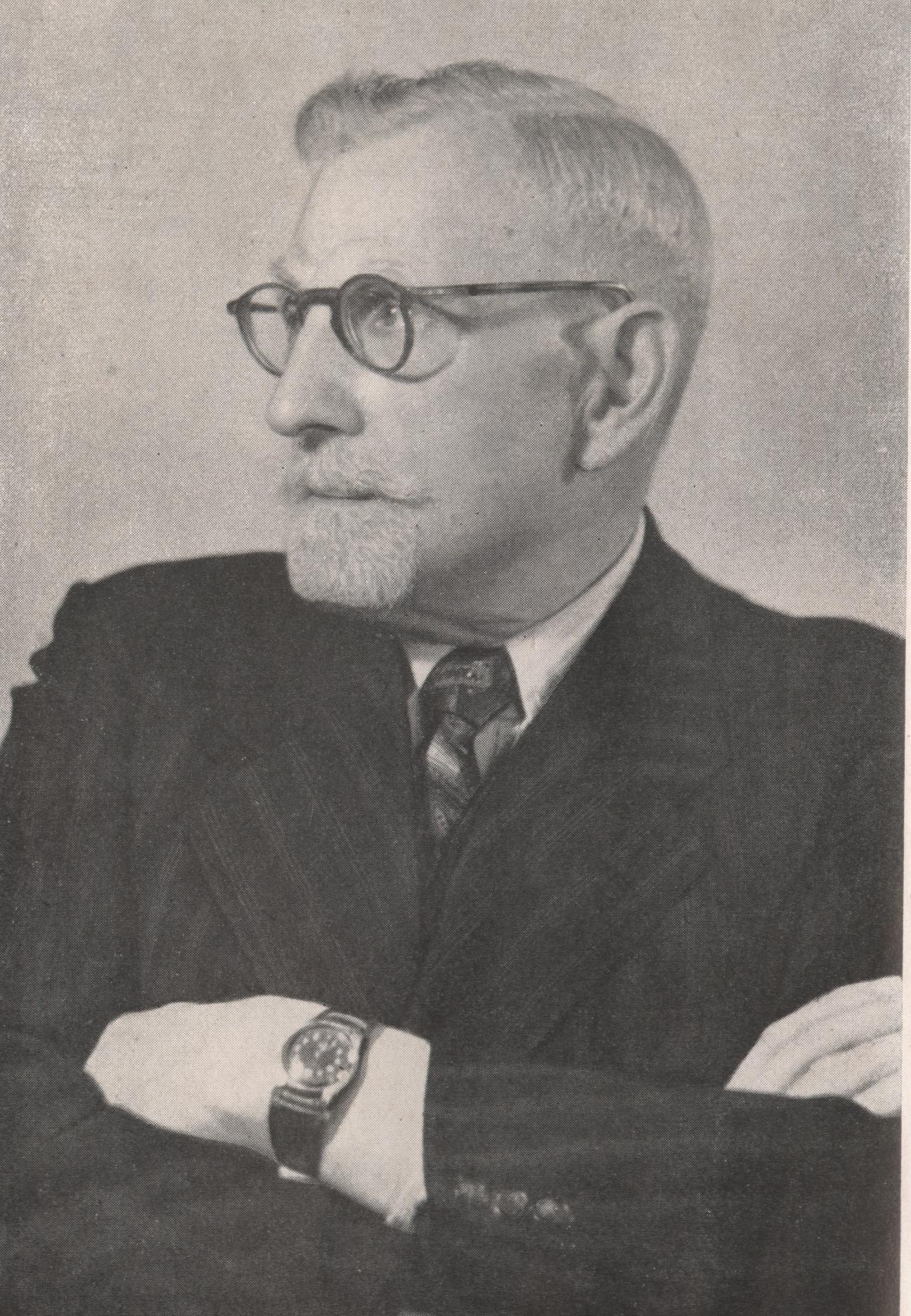 Joseph Joos katholischer Laie